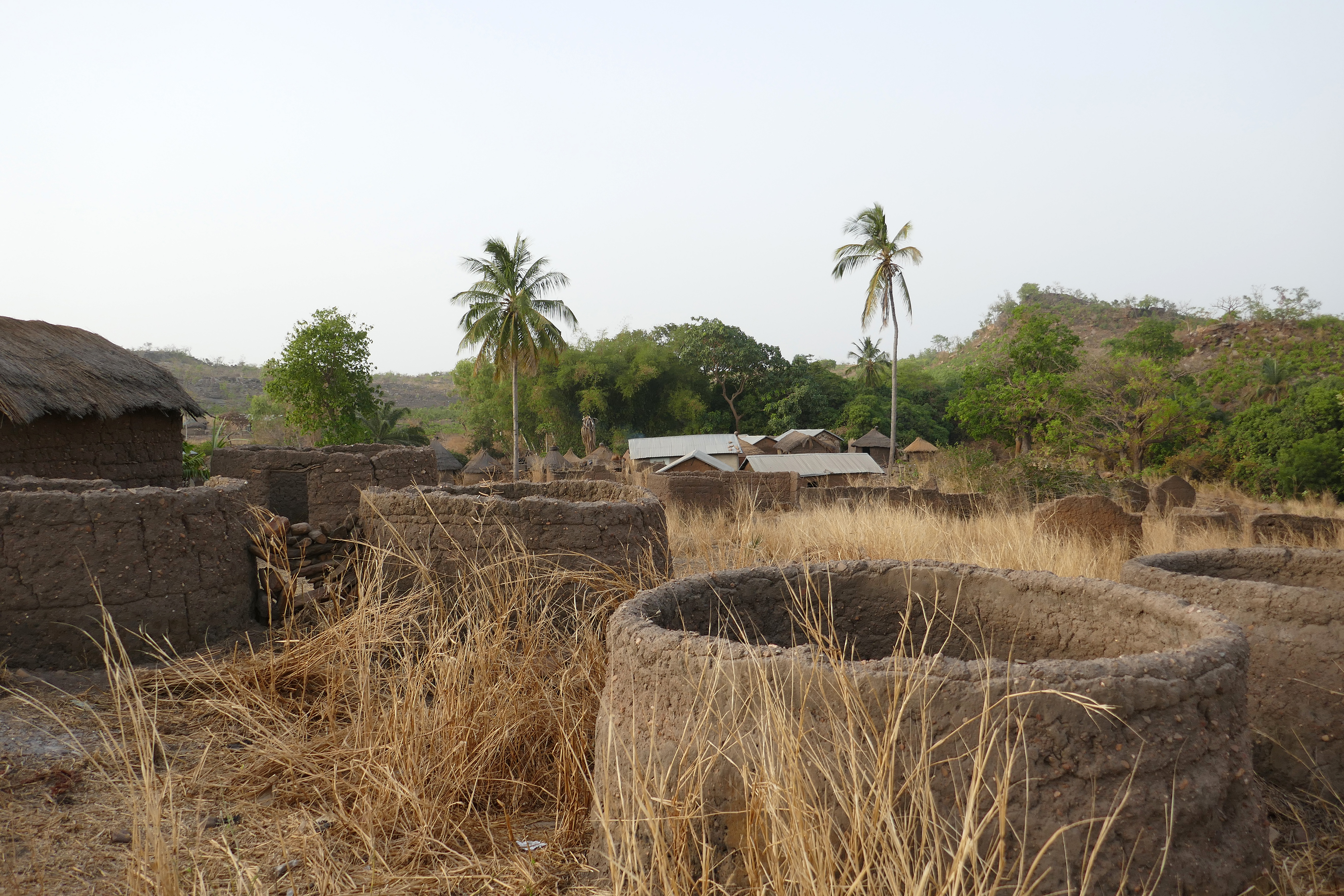 Le village de Tanéka-Béri (commune de Copargo) au Bénin.